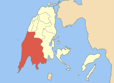 Locator map of Apollonii municipality (Δήμος Απολλωνίων) in Lefkada prefecture (Νομός Λευκάδας) in Greece.